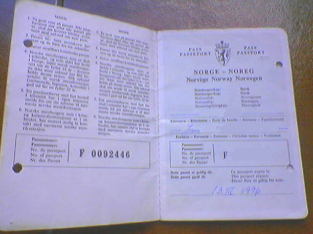 Pass norsk innsiden 1990.